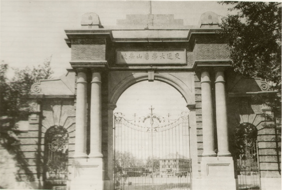 交通大学唐山学校（老唐院）校门